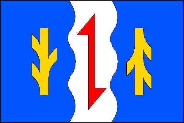 Vlajka obce Jetřichov